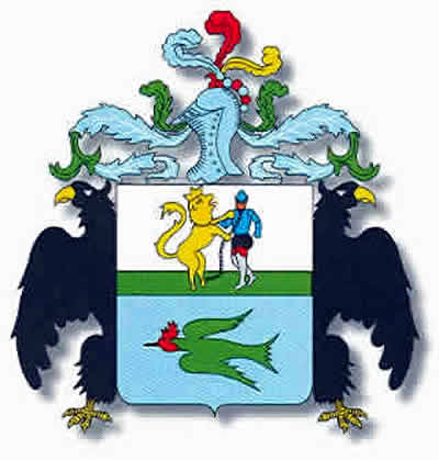 Escudo de Huánuco